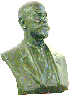 Büste von Heinrich Büssing im Heinrich-Büssing-Haus in Wolfsburg-Nordsteimke